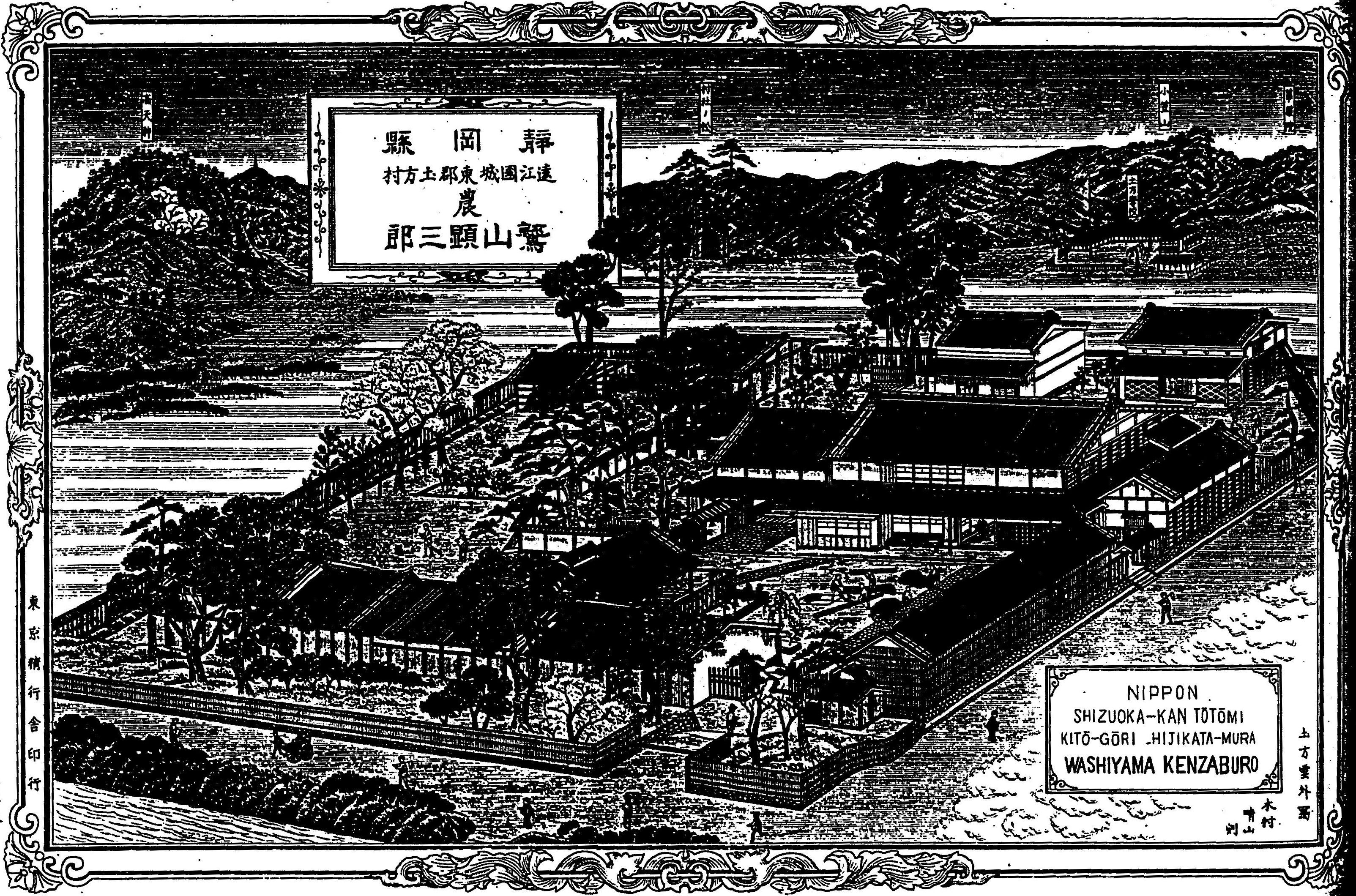 靑山豊太郎編『日本博覧圖――靜岡縣』初篇、精行舎、1892年。